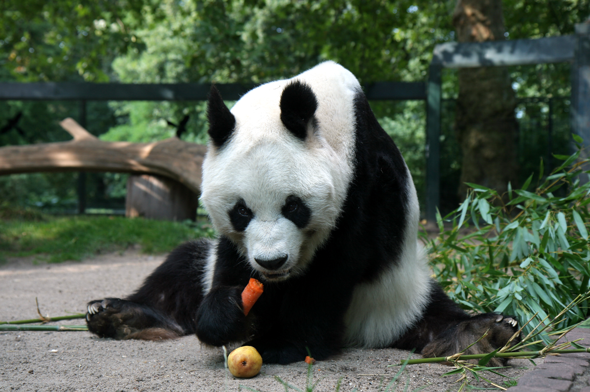 Großer Panda (Ailuropoda melanoleuca) „Bao Bao“ (* 1978 in China, † 22. August 2012 in Berlin) im Zoologischen Garten in Berlin.